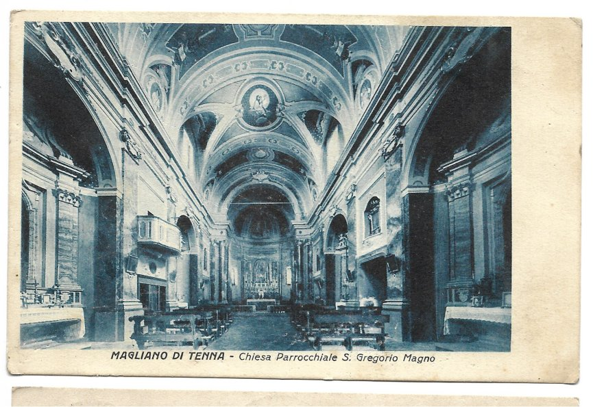 Magliano di Tenna - Chiesa Parrocchiale di San Gregorio Magno